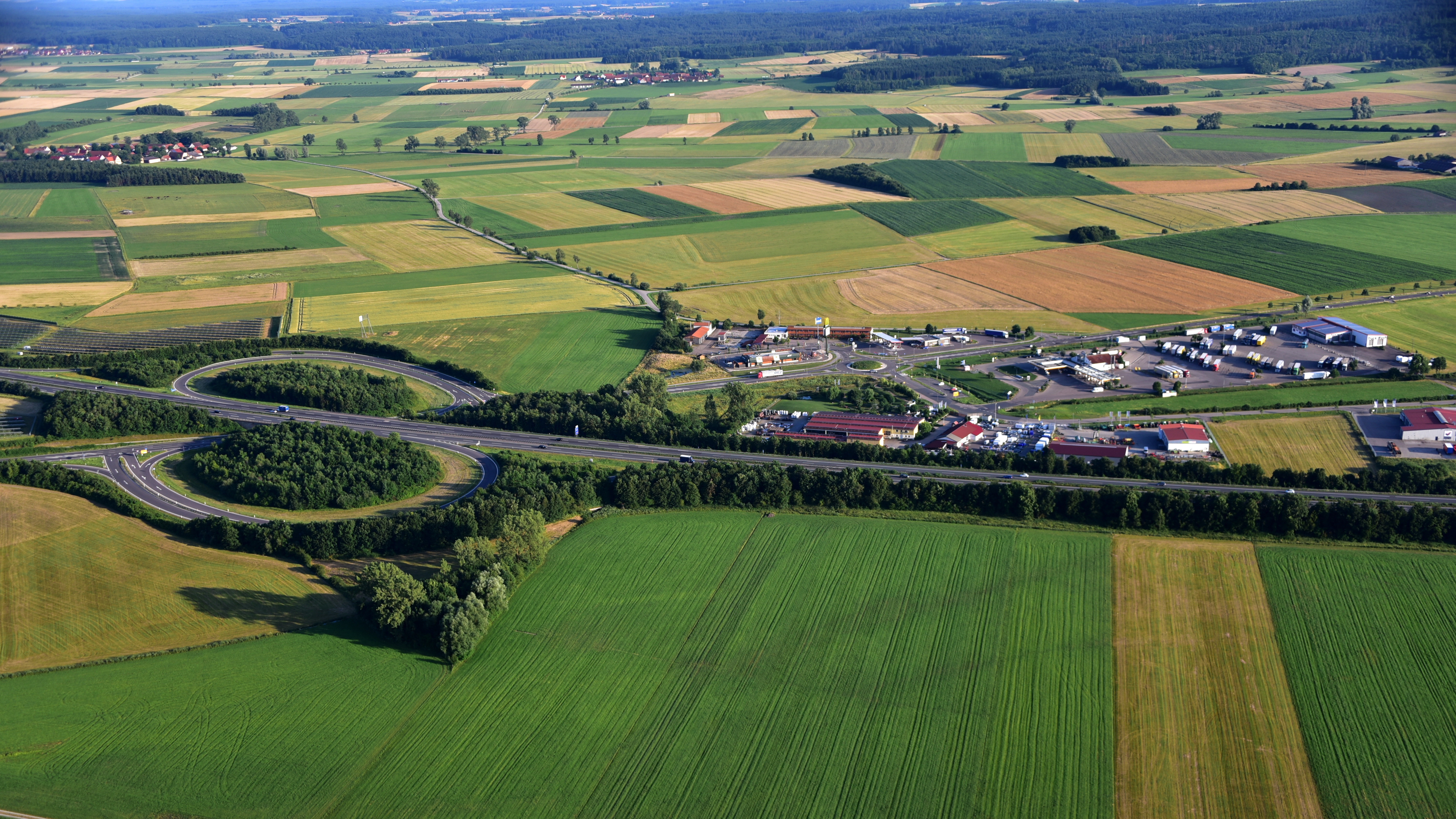 BAB 6, Autohof Aurach, Luftaufnahme (2016)